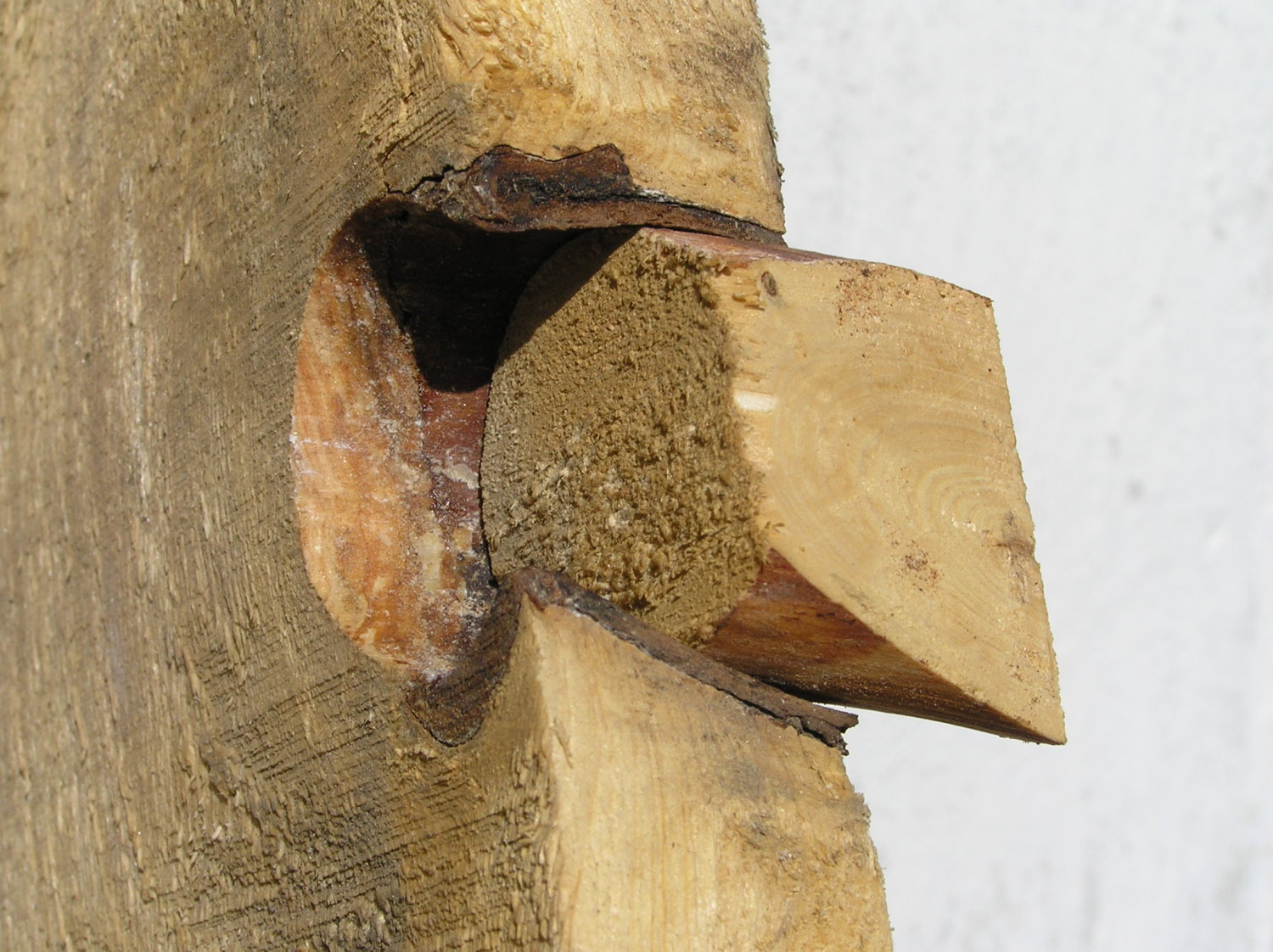 sęk niezrośnięty (wypadający)